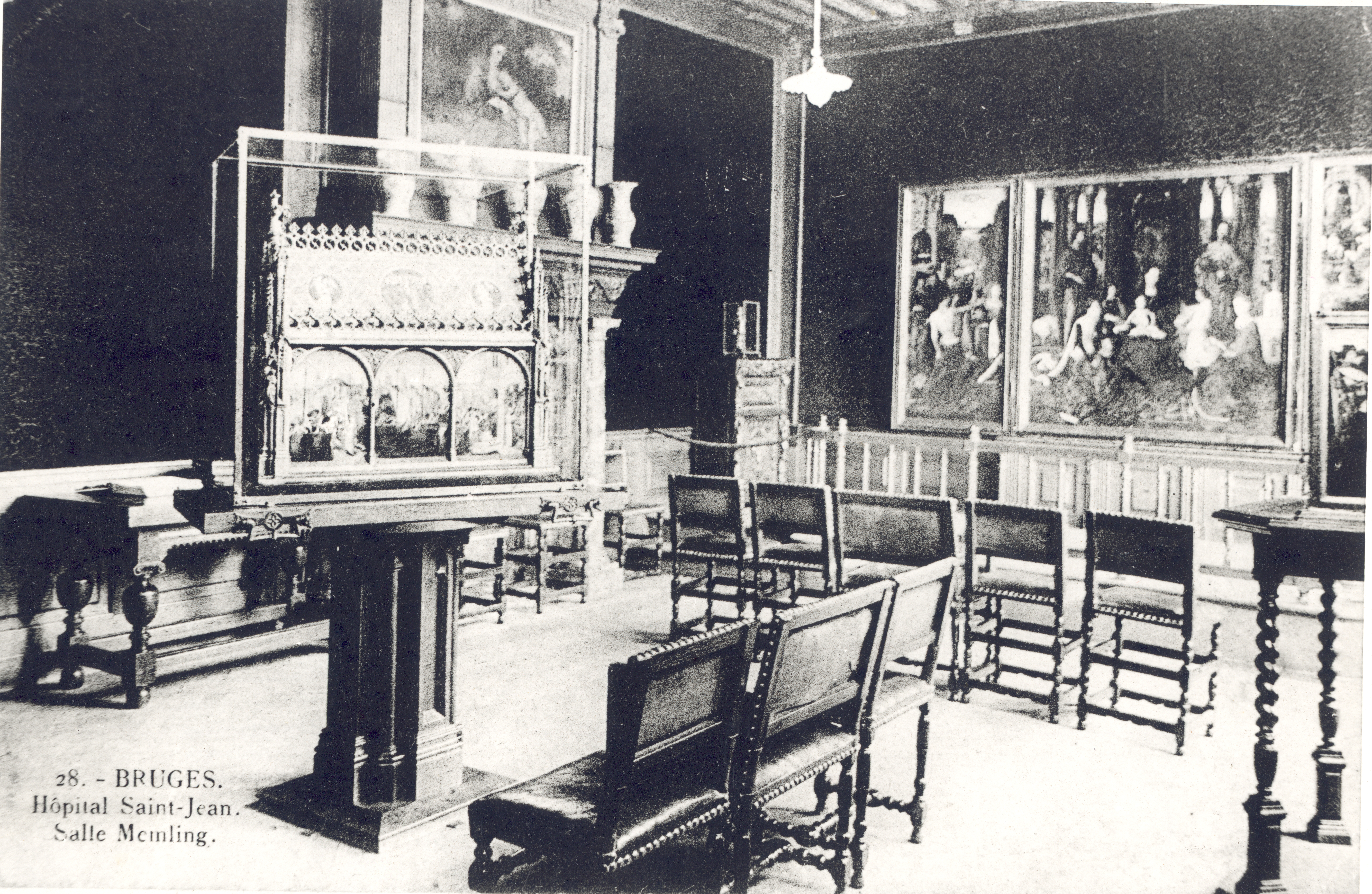 Zicht in het eerste Memlingmuseum in de kapittelzaal van het zusterklooster van het SintJanshospitaal in Brugge, 19de eeuw